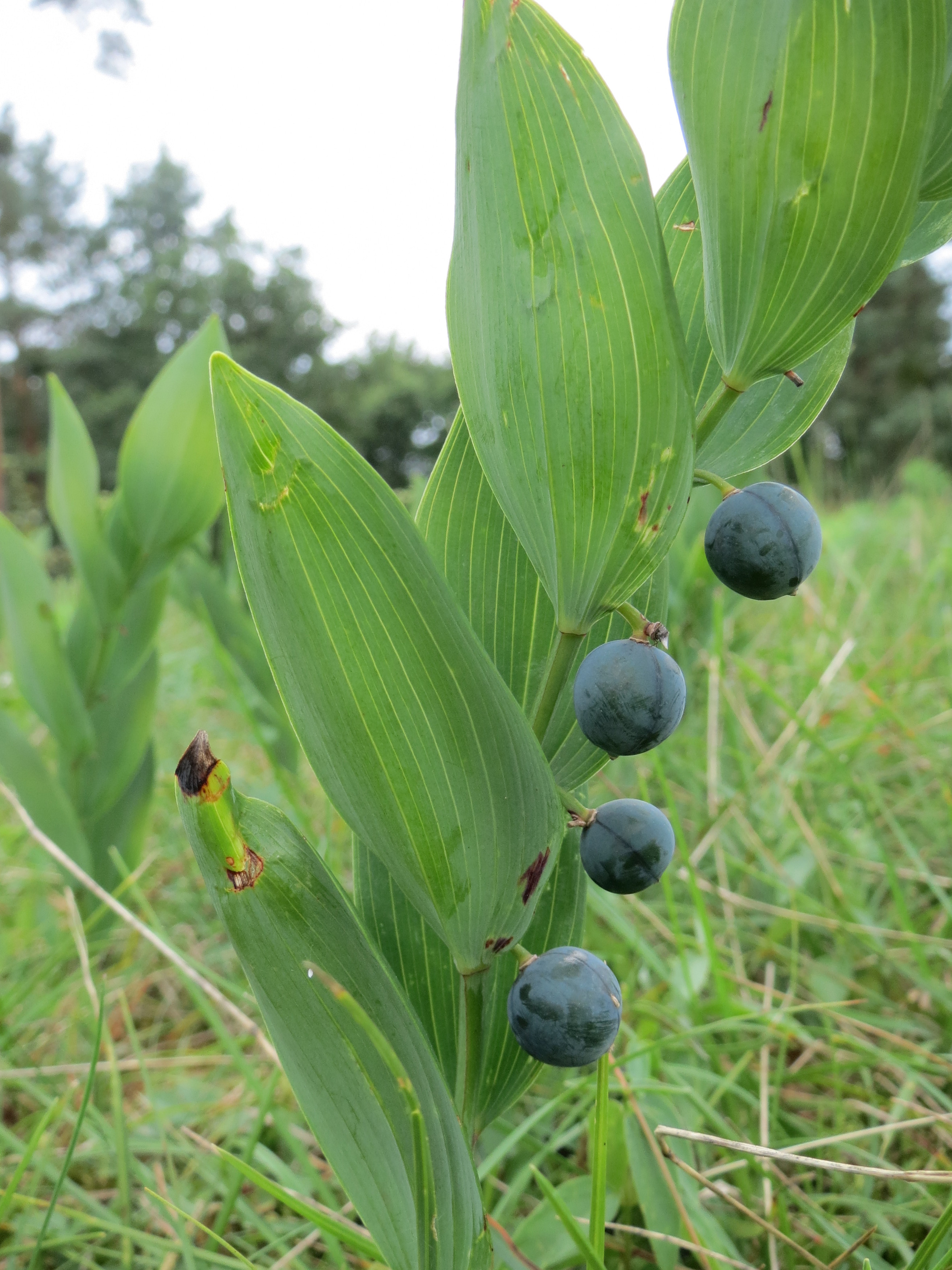 Echtes Salomonssiegel (Polygonatum odoratum) auf dem Feldherrenhügel (Naturschutzgebiet „Oftersheimer Dünen“)